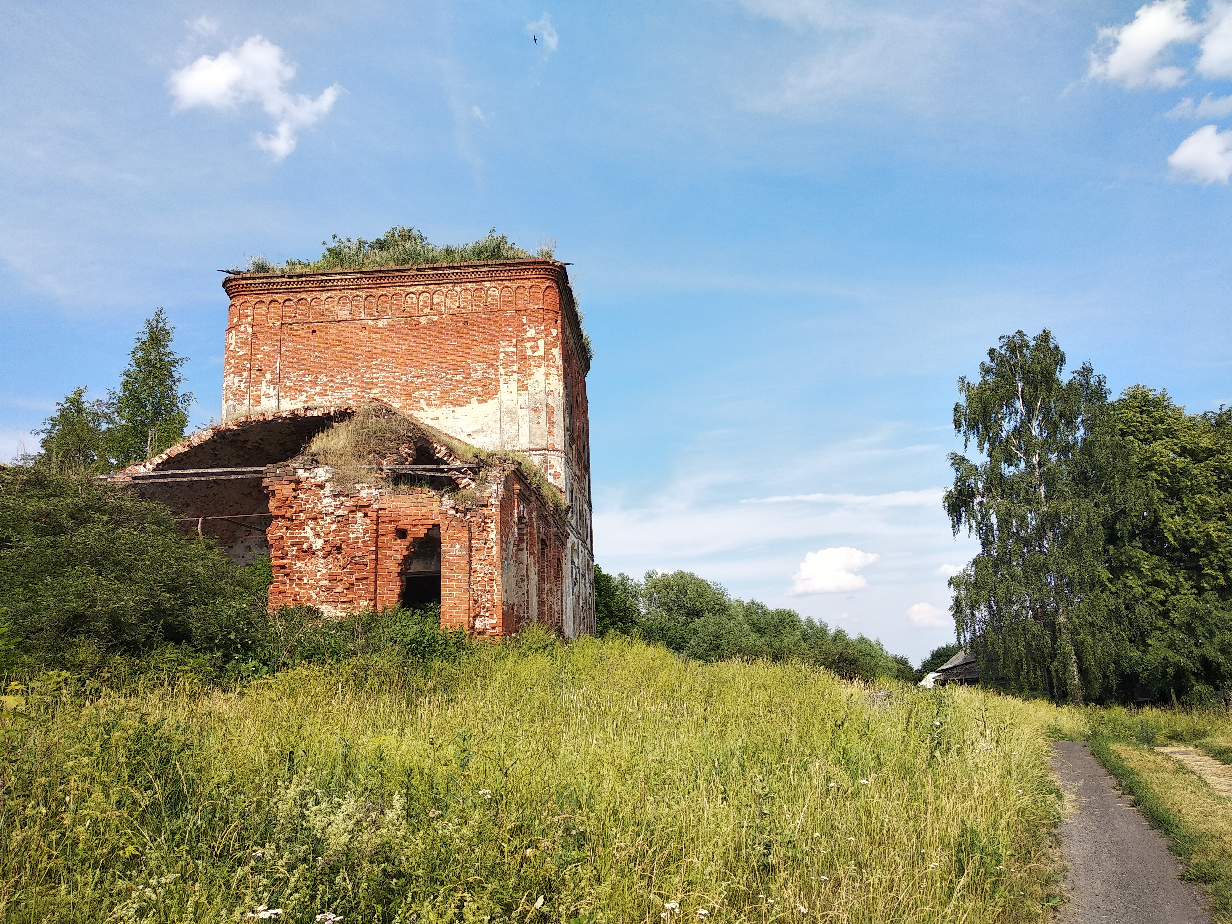 Церковь Троицы Живоначальной (Троицко-Евстафиевский храм) в селе Зверинец (Ярославская область)